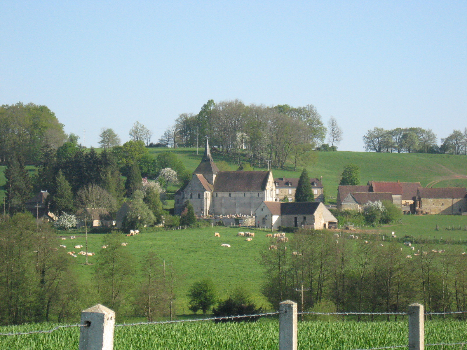 vue du nord ouest